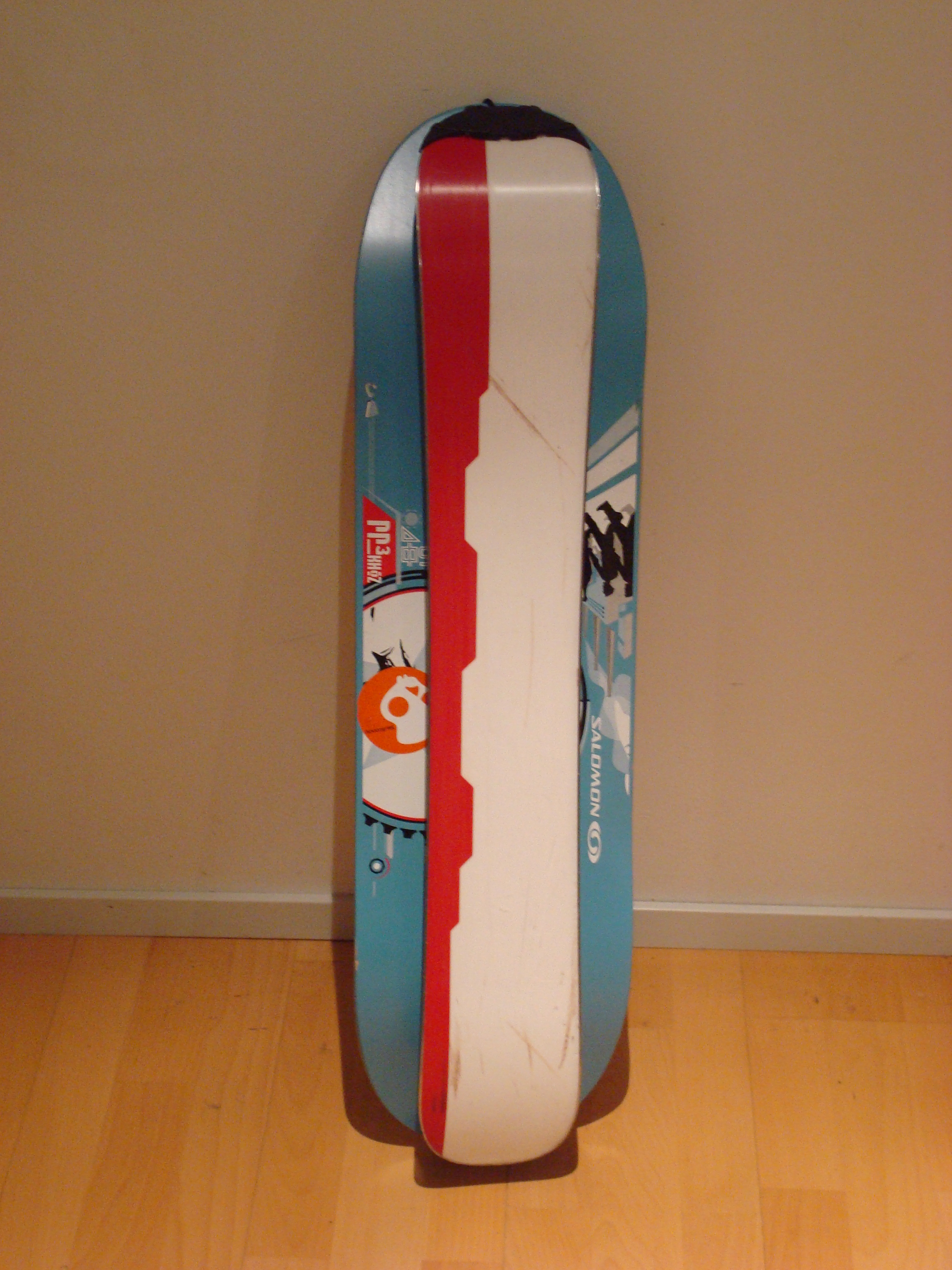 Salomonin valmistama lumiskeitti alapuolelta